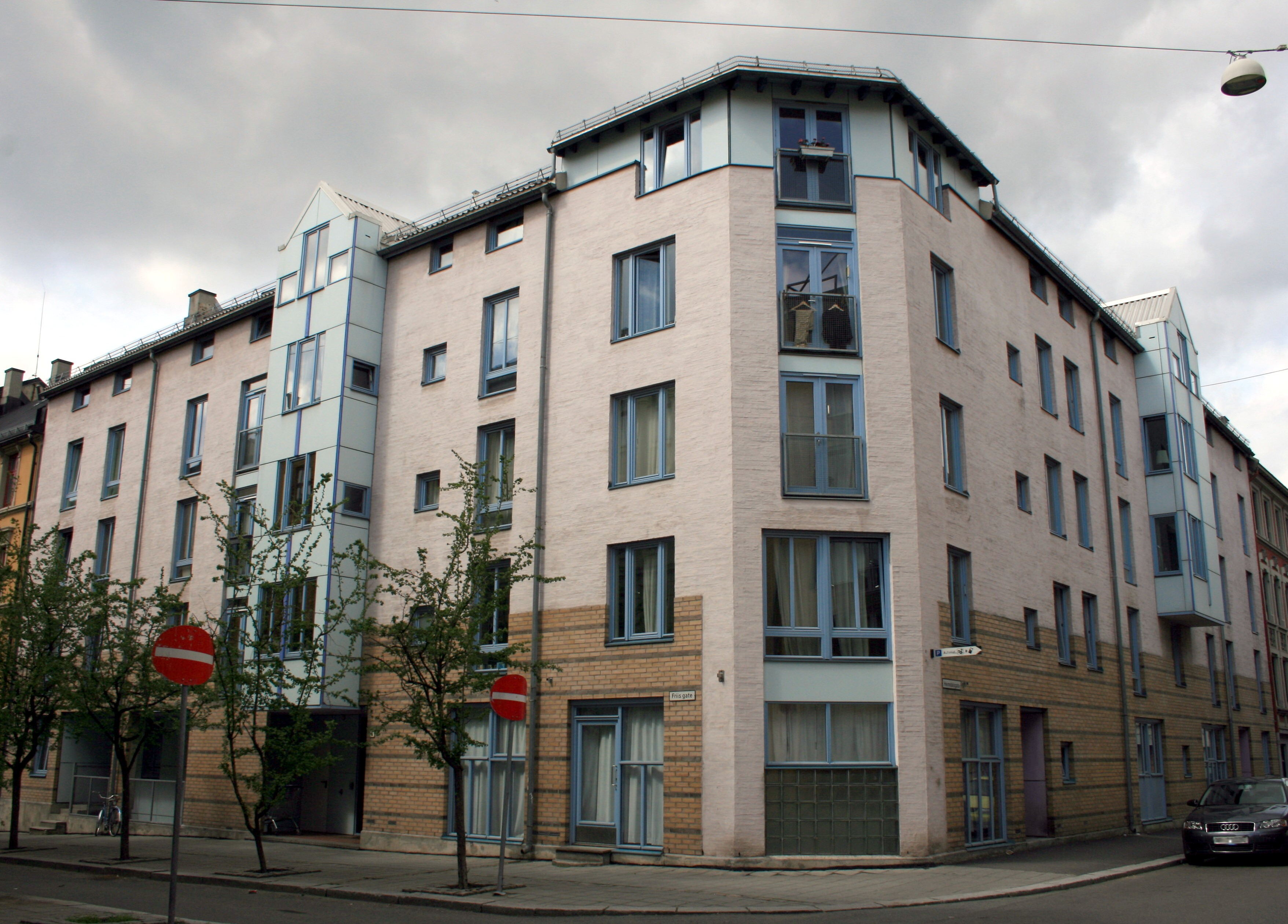 Borettslaget Friis' gate 6 på Grønland i Oslo. Oppført 1987.